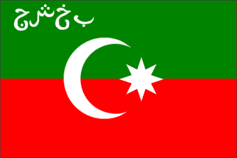 Флаг Бухары (с 20 сентября 1920 по 23 сентября 1921 года)